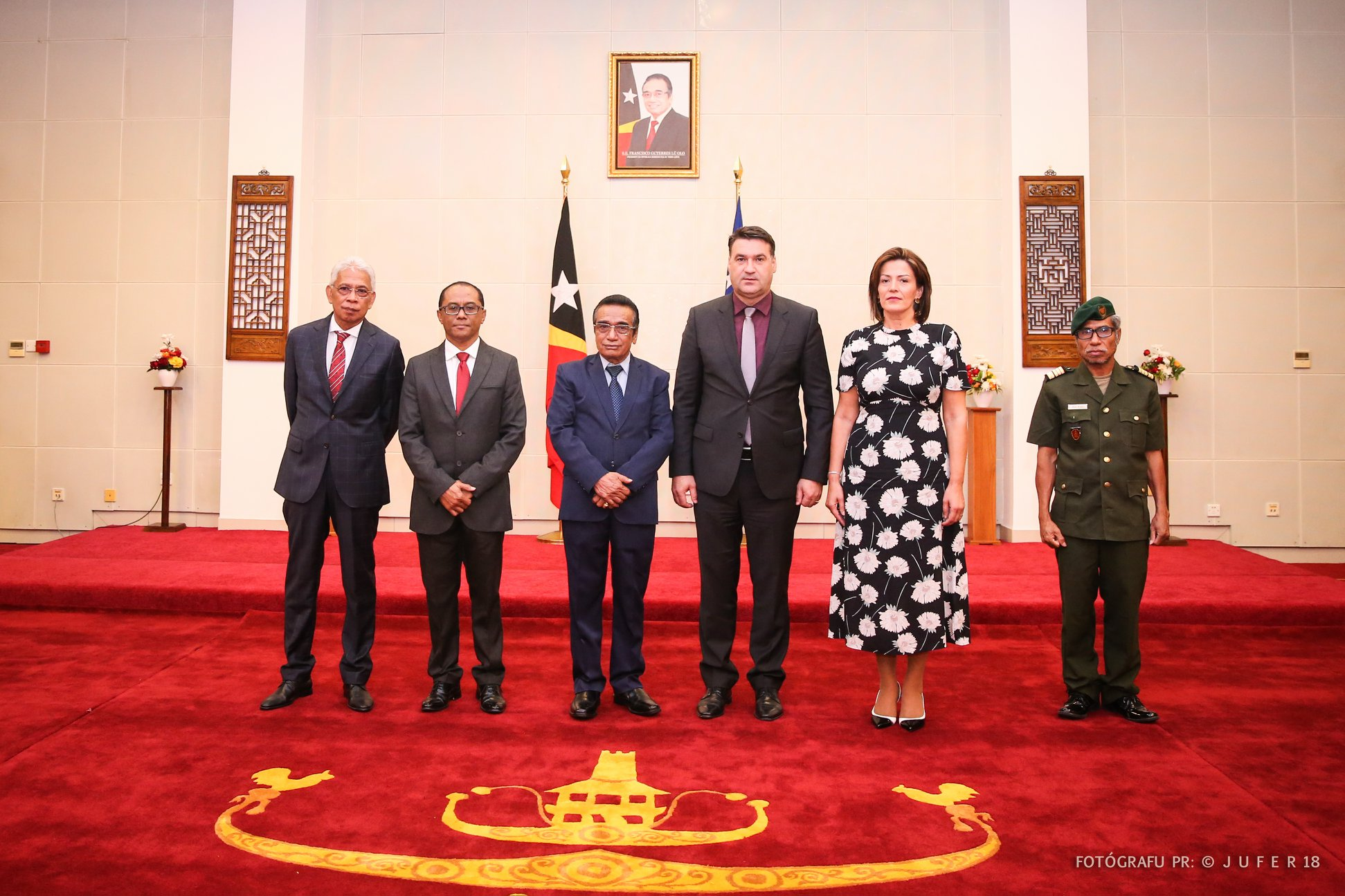 Mehmed Halilović übergibt seine Akkreditierung als BotschafterBosnien und Herzegowinas an Osttimors Staatspräsident Francisco Guterres.